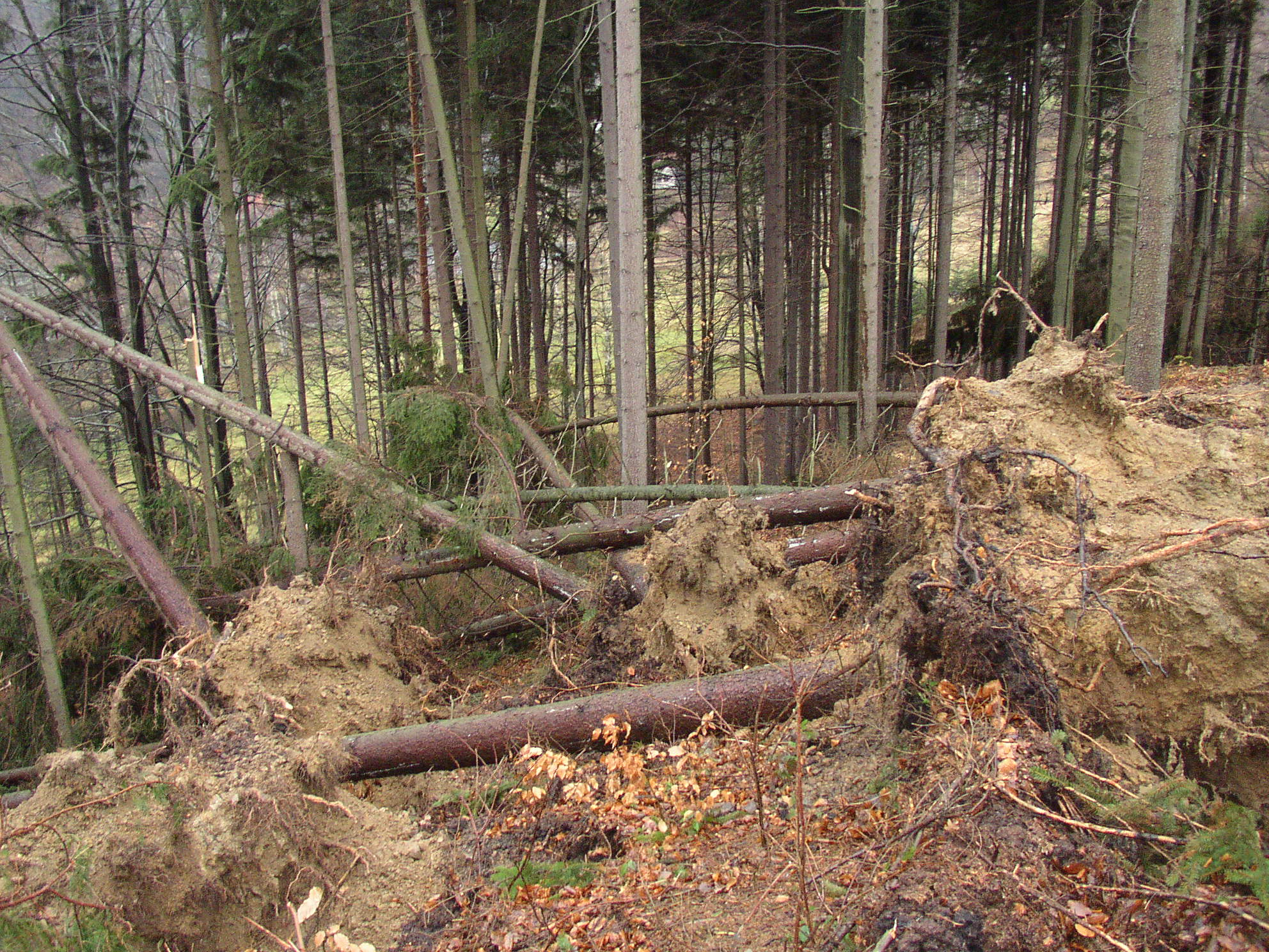 Les po orkánu Kyrill, Lužické hory